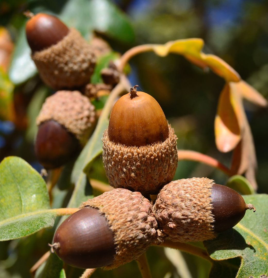 Prádena (Madrid)